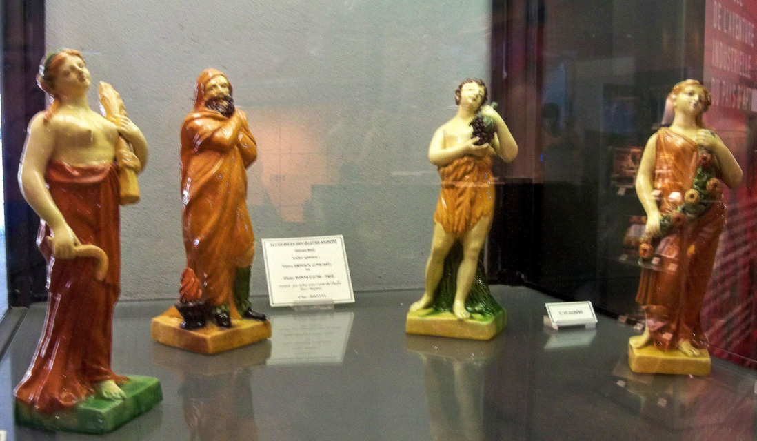 sujets en faience d'Apt (84)